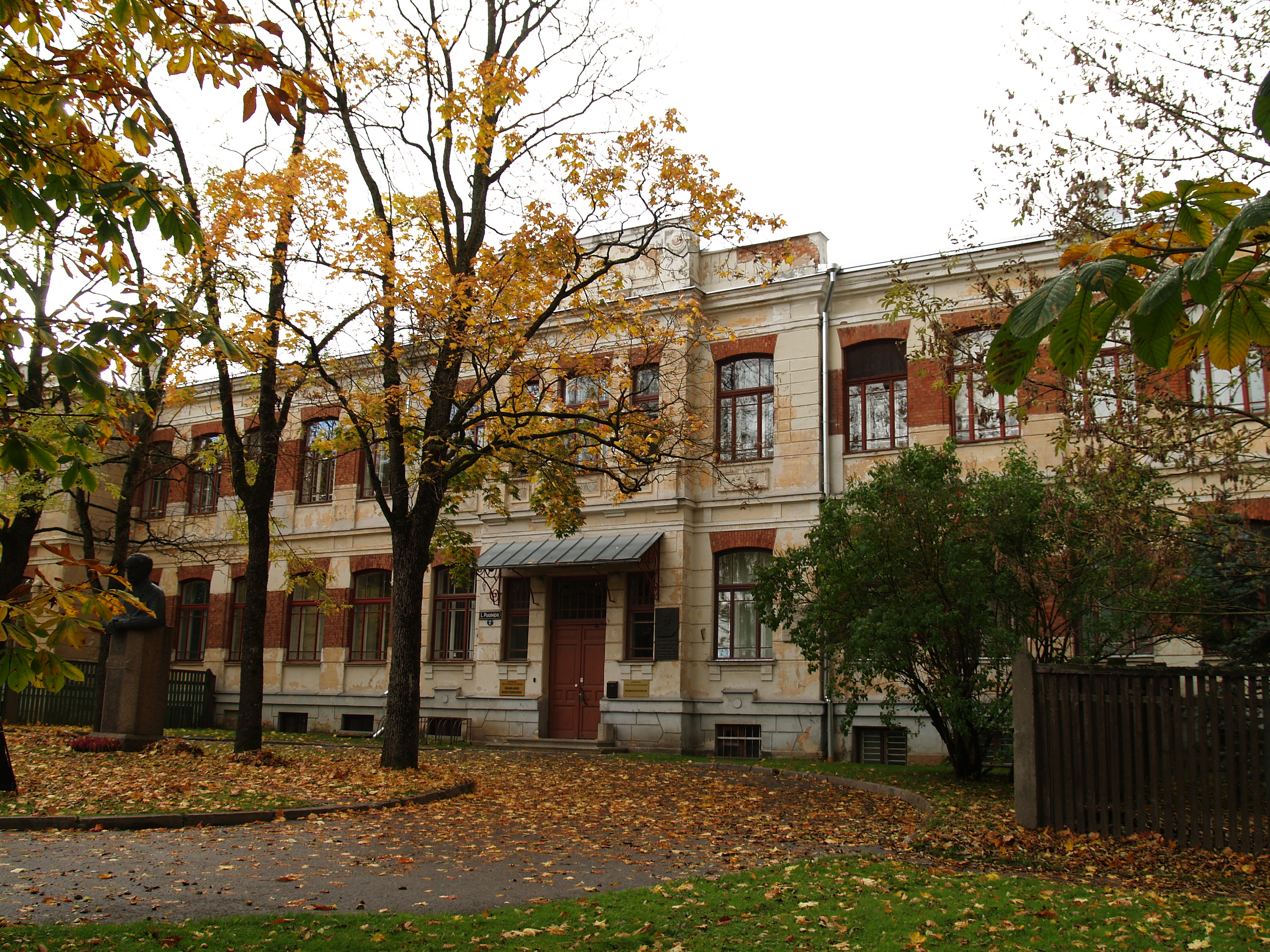 Tartu Maarjamõisa kliiniku hoone Puusepa 2, 1914-1915.a. Arhitekt Pavel Fjodorovitš Nikitin (1879-1931).